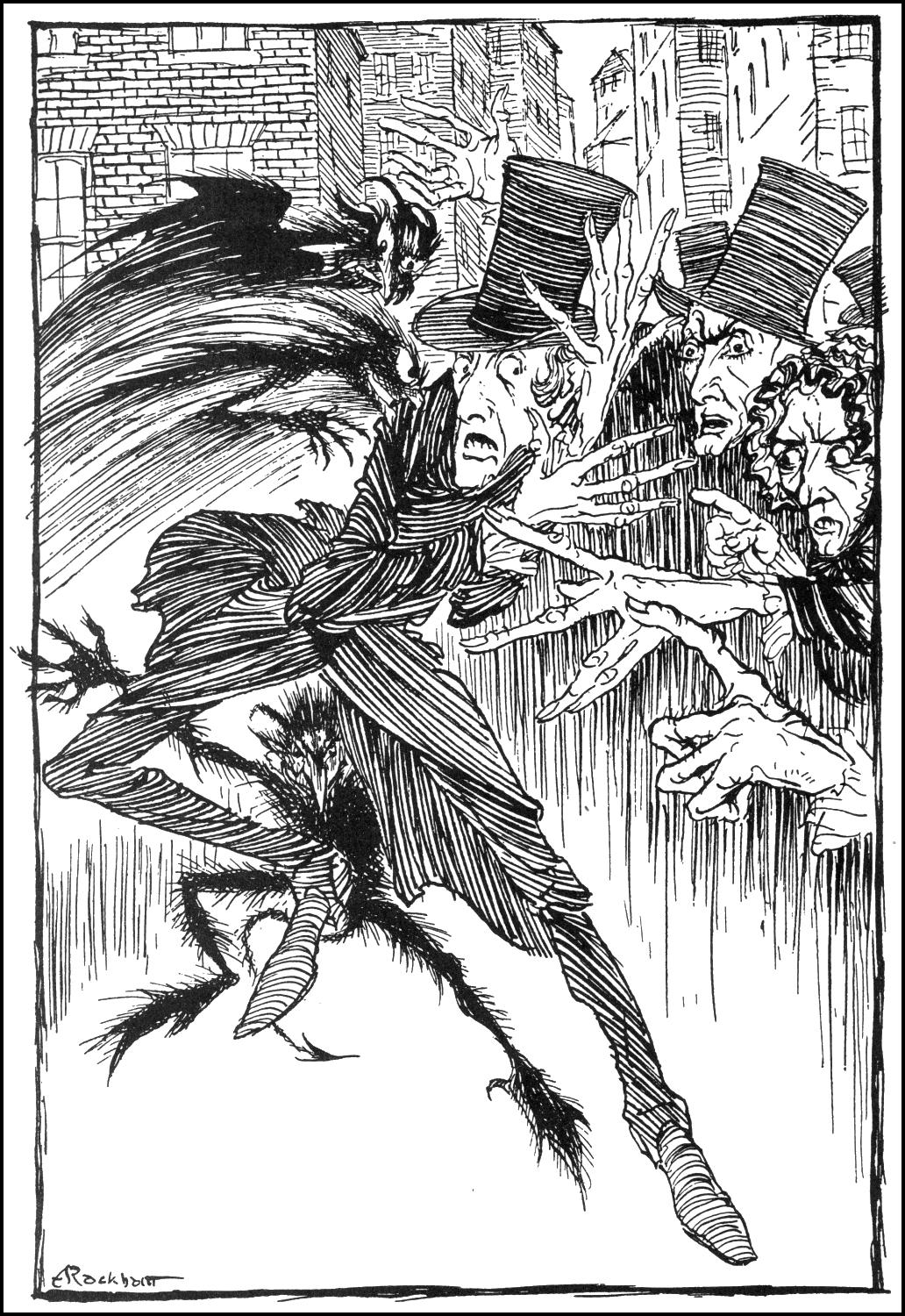 Иллюстрация Артура Рэкхема из книги "Poe's Tales of Mystery and Imagination" к рассказу Эдгара По "Бес противоречия"